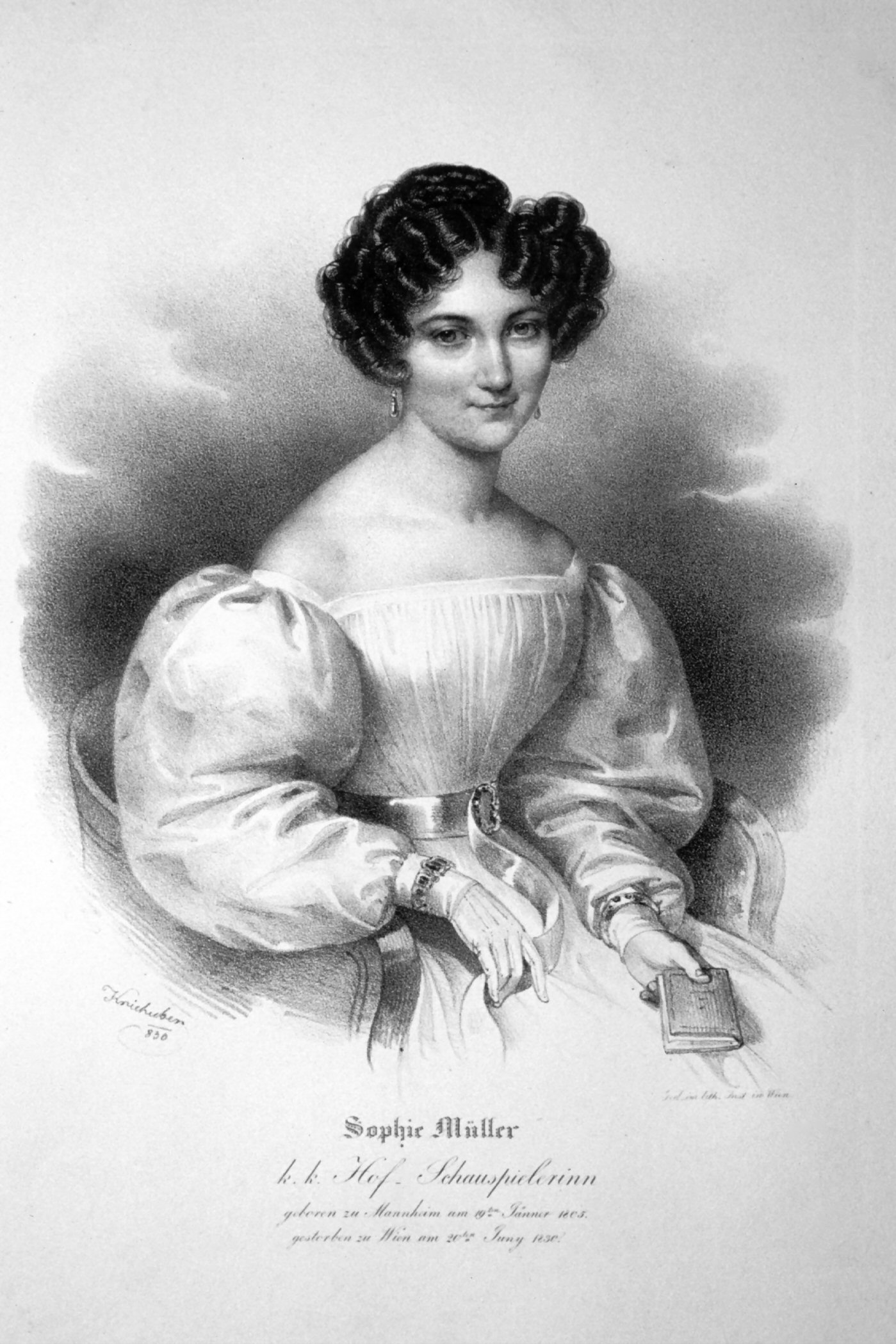 Sophie Müller (1803-1839), deutsch-österreichische Schauspielerin Lithographie von Josef Kriehuber, 1830